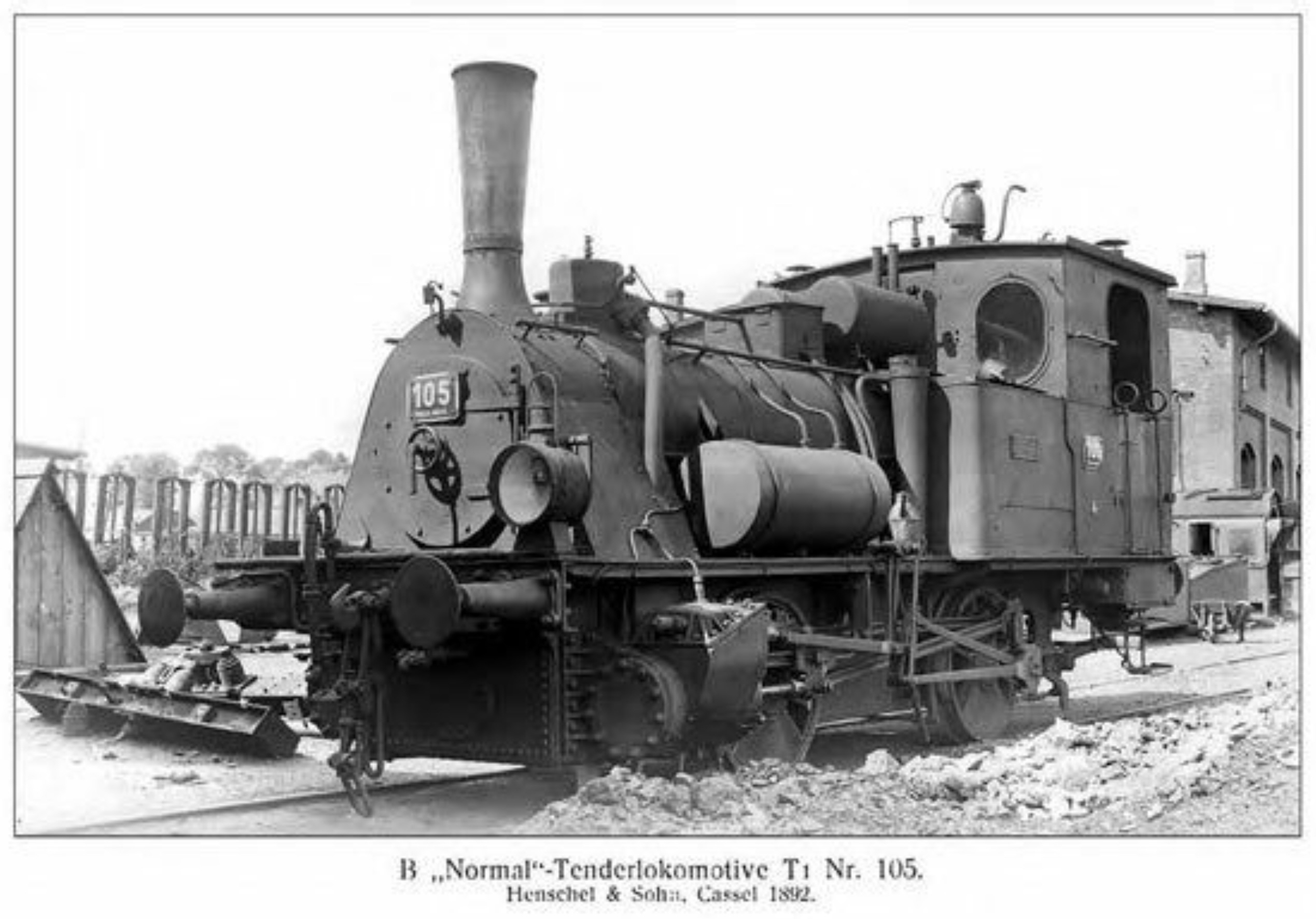 Damplokomotive der Bauart T 1 der Lübeck-Büchener Eisenbahn, Nr. 105 (1938 88 7002 der Deutschen Reichsbahn, 1952 98 7087 der Deutschen Reichsbahn in der DDR, 1957 verschrottet)